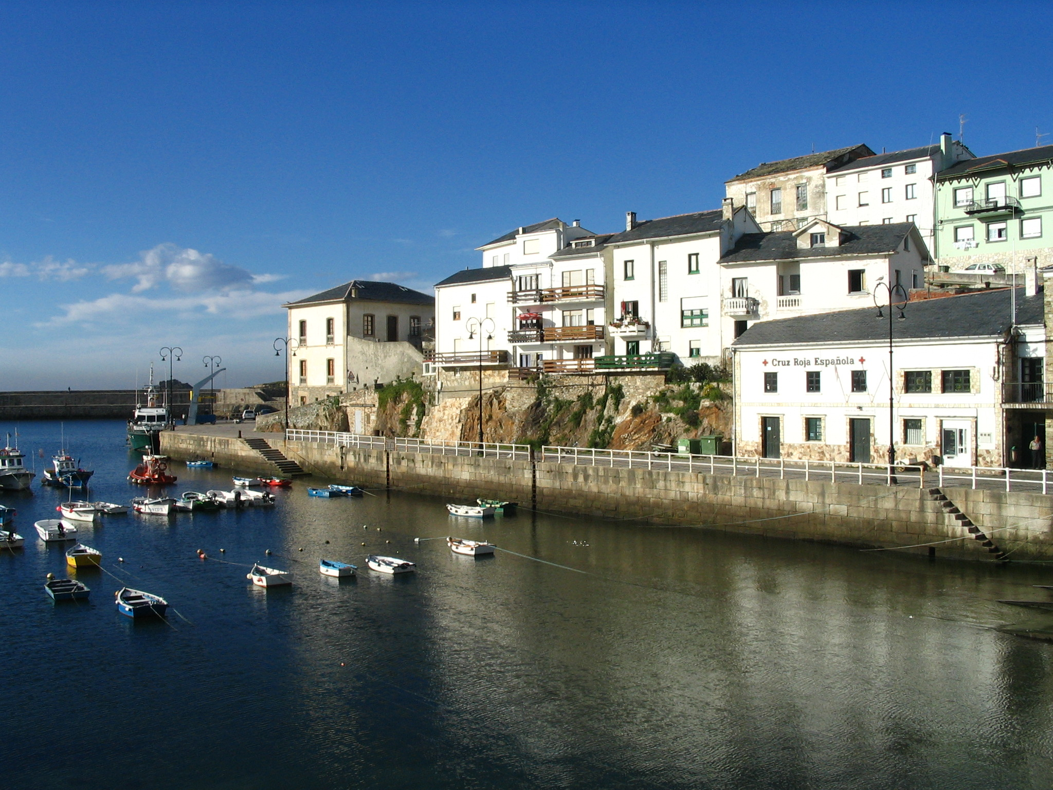 Tapia de Casariego in Asturien